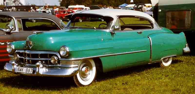 1950 Cadillac Series 50-6237DX Coupe de Ville